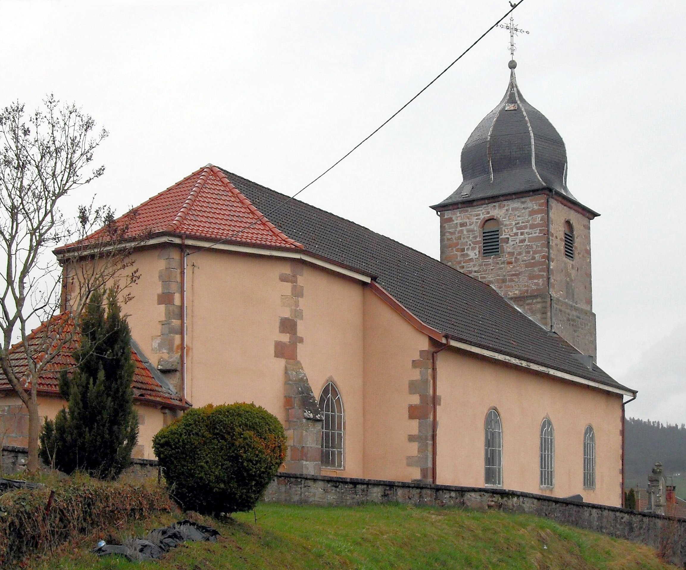 L'église paroissiale Sainte-Menne à La Chapelle-devant-Bruyères